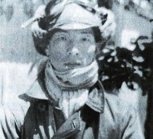 荻谷信男